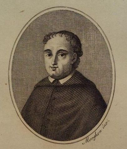 Agostino Pantò, presbitero